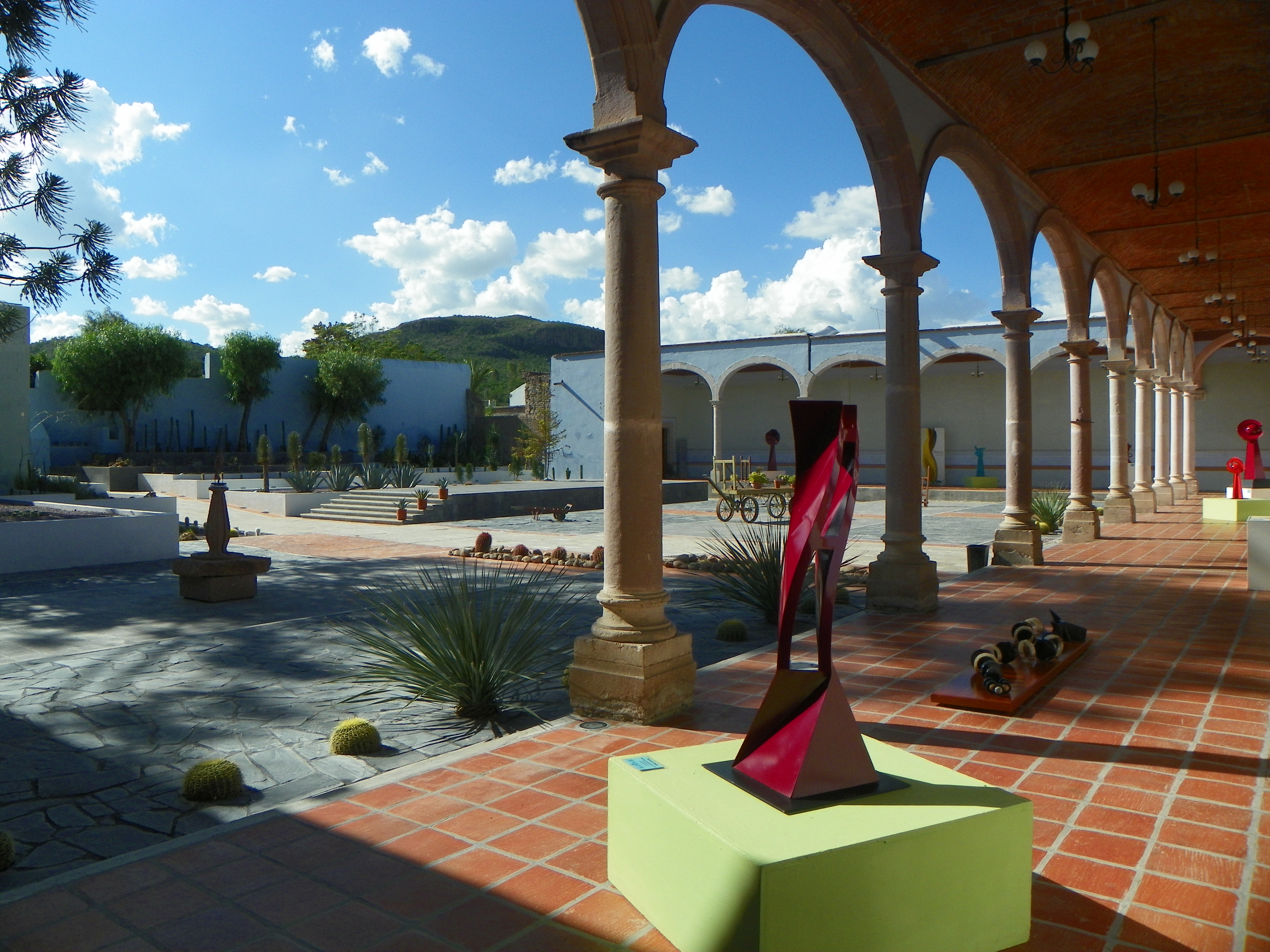 Antigua hacienda del siglo XVI, donde se le retiró el mando del ejército insurgente a Miguel Hidalgo y Costilla. Actual Museo de la Insurgencia es un buen ejemplo de las haciendas agrícolas que alimentaban el Camino Real de Tierra Adentro. Ubicada en la comunidad de Pabellón de Hidalgo en el Municipio de Rincón de Romos, Aguascalientes, México, es Patrimonio de la Humanidad desde 2010 dentro del Camino Real de Tierra Adentro.